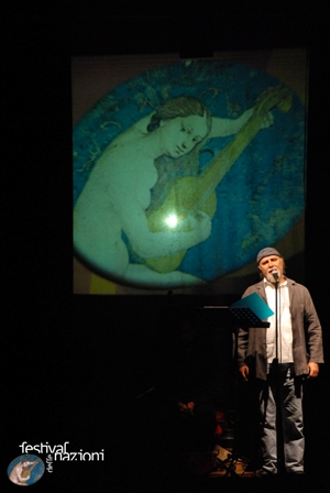 Descrizione: Moni Ovadia alla 41° edizione del Festival Autore: Stefano Giogli Fonte: Festival delle Nazioni Licenza: vedi sotto